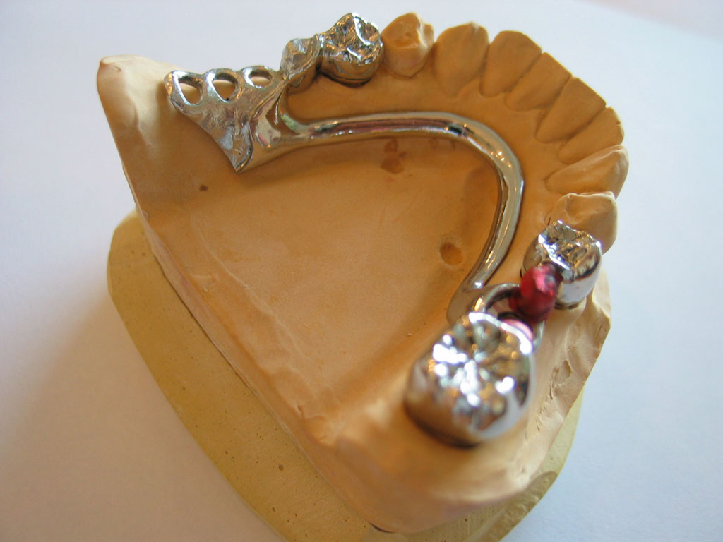 Modellguß mit Geschiebe; Phantomarbeit; provisorisch befestigt mit Pattern Resin